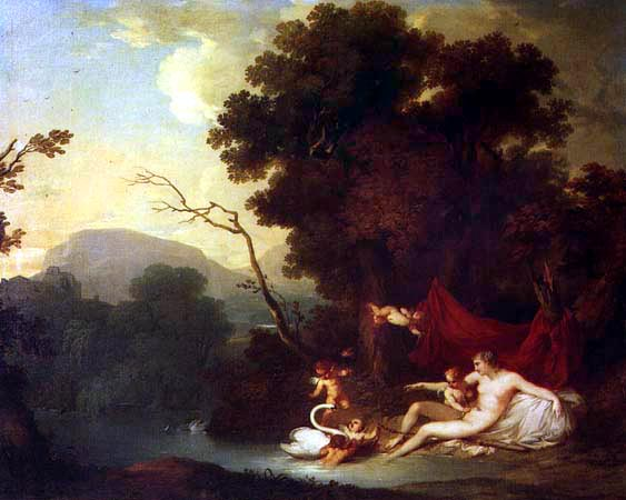 Leda e o Cisne